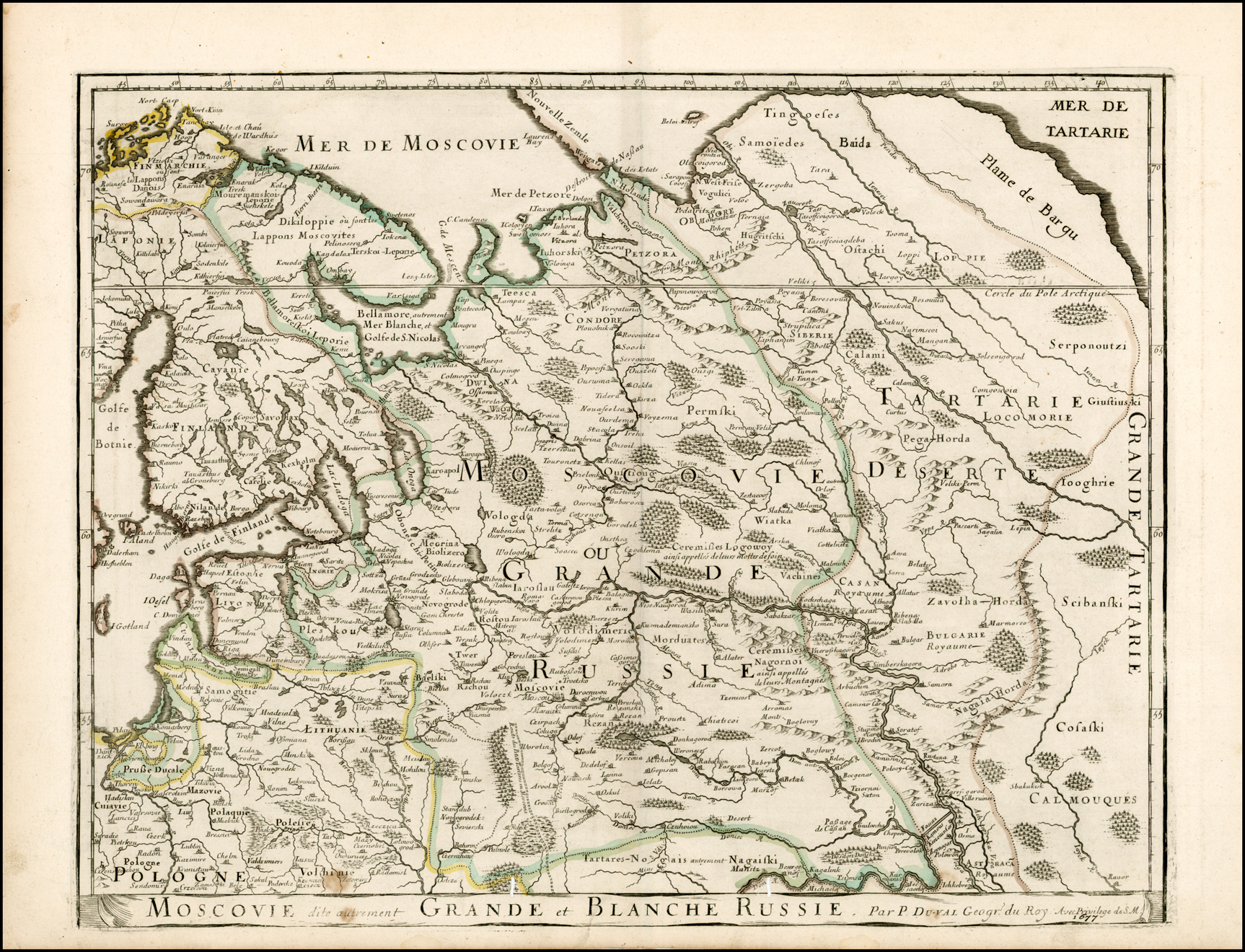 Pierre Du Val. Moscovie dite autrement Grande et Blanche Russie. Paris, 1677